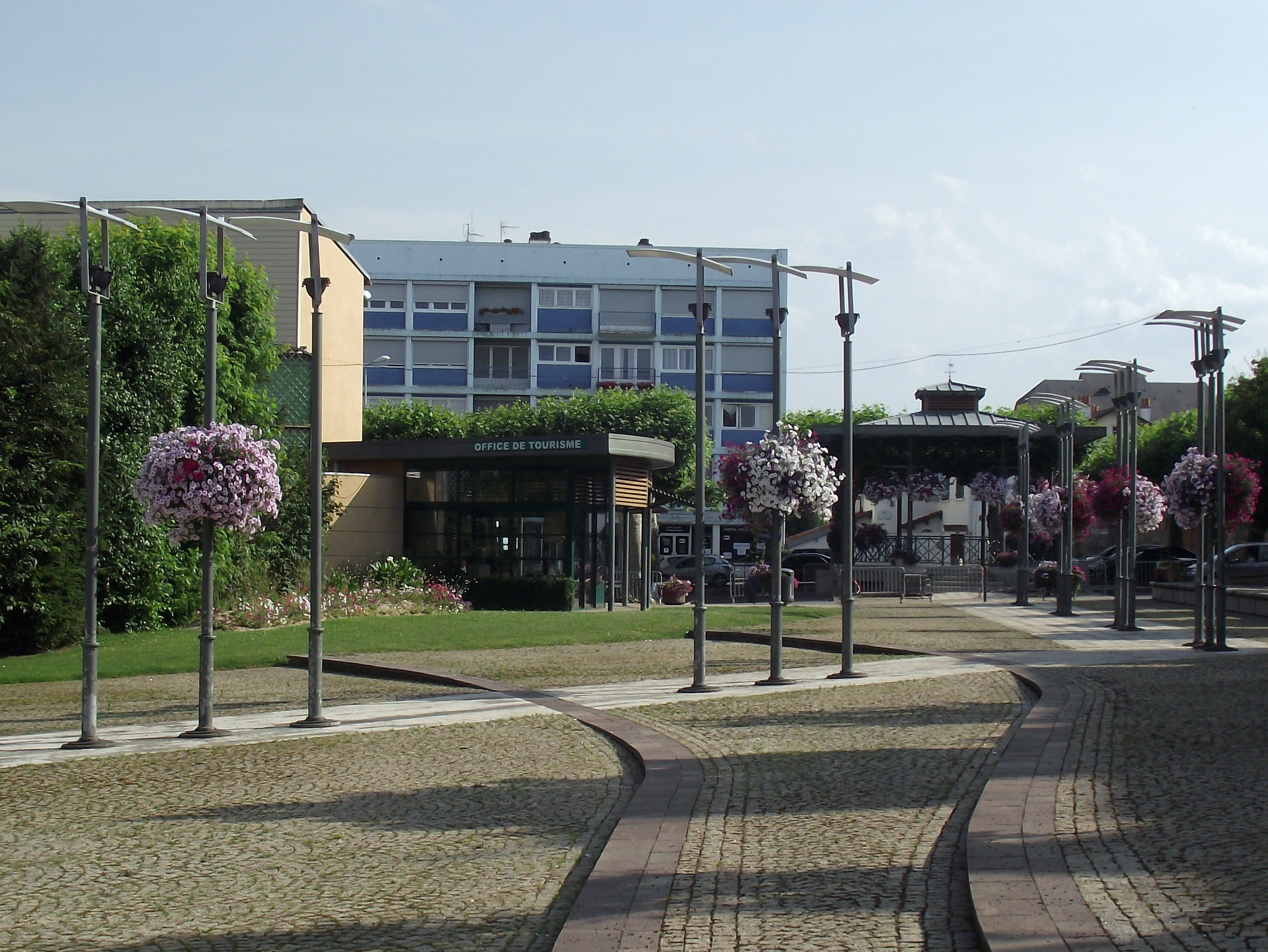 Place des Droits de l'Homme et du Citoyen (Lannemezan,Hautes-Pyrénées)